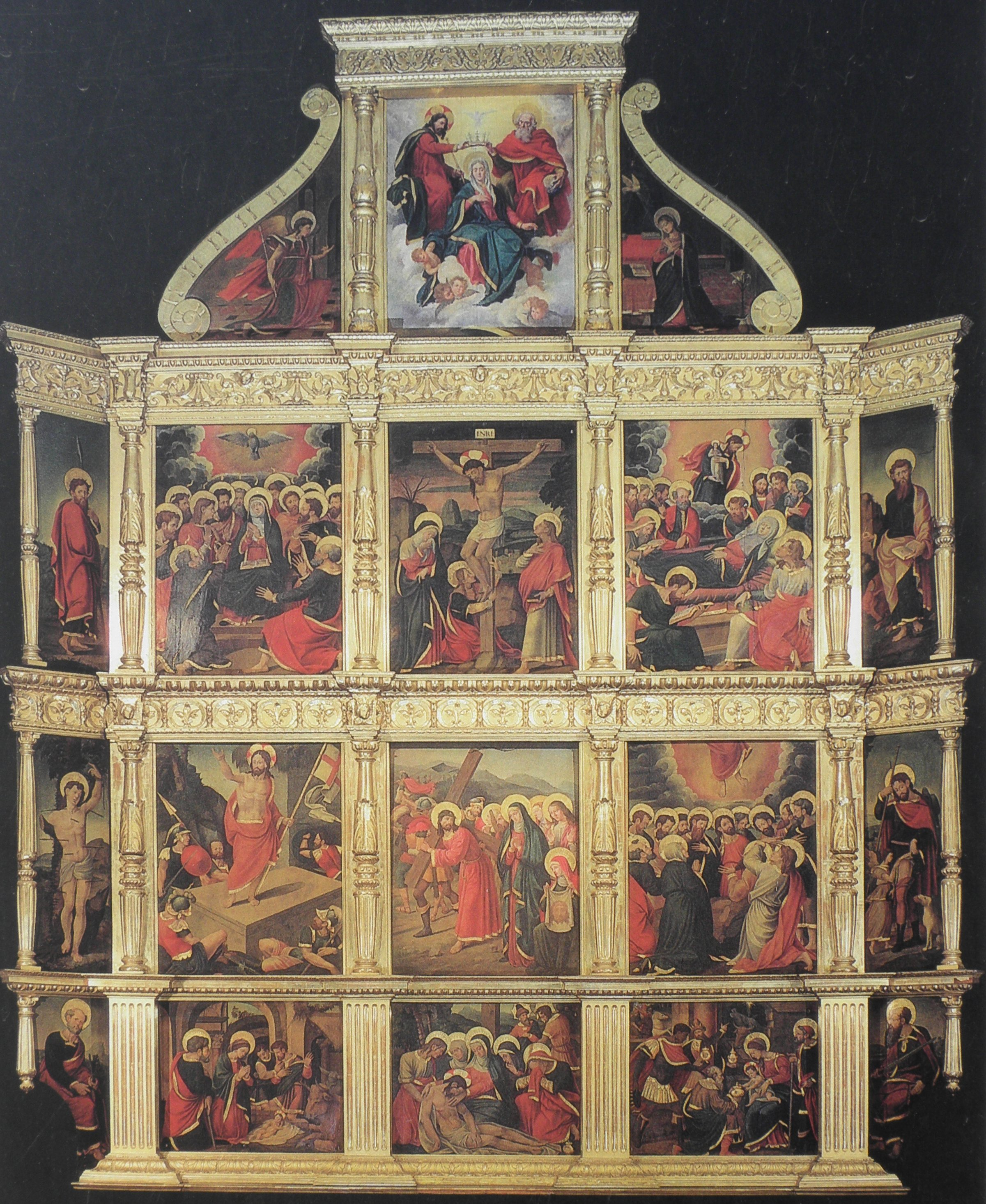 Retaule gòtic-renaixentista del Santuari d'El Miracle (Riner, Solsonès) obra de Pere Nunyes (1530)